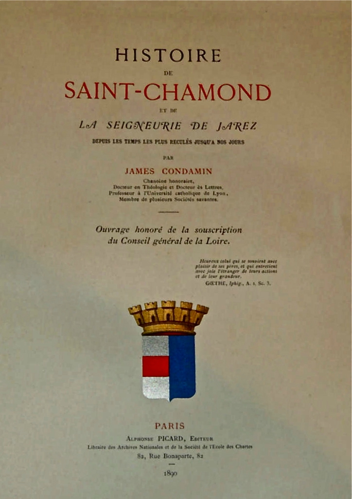 James Condamin "Histoire Saint-Chamond" (1890) ; page de titre interne.